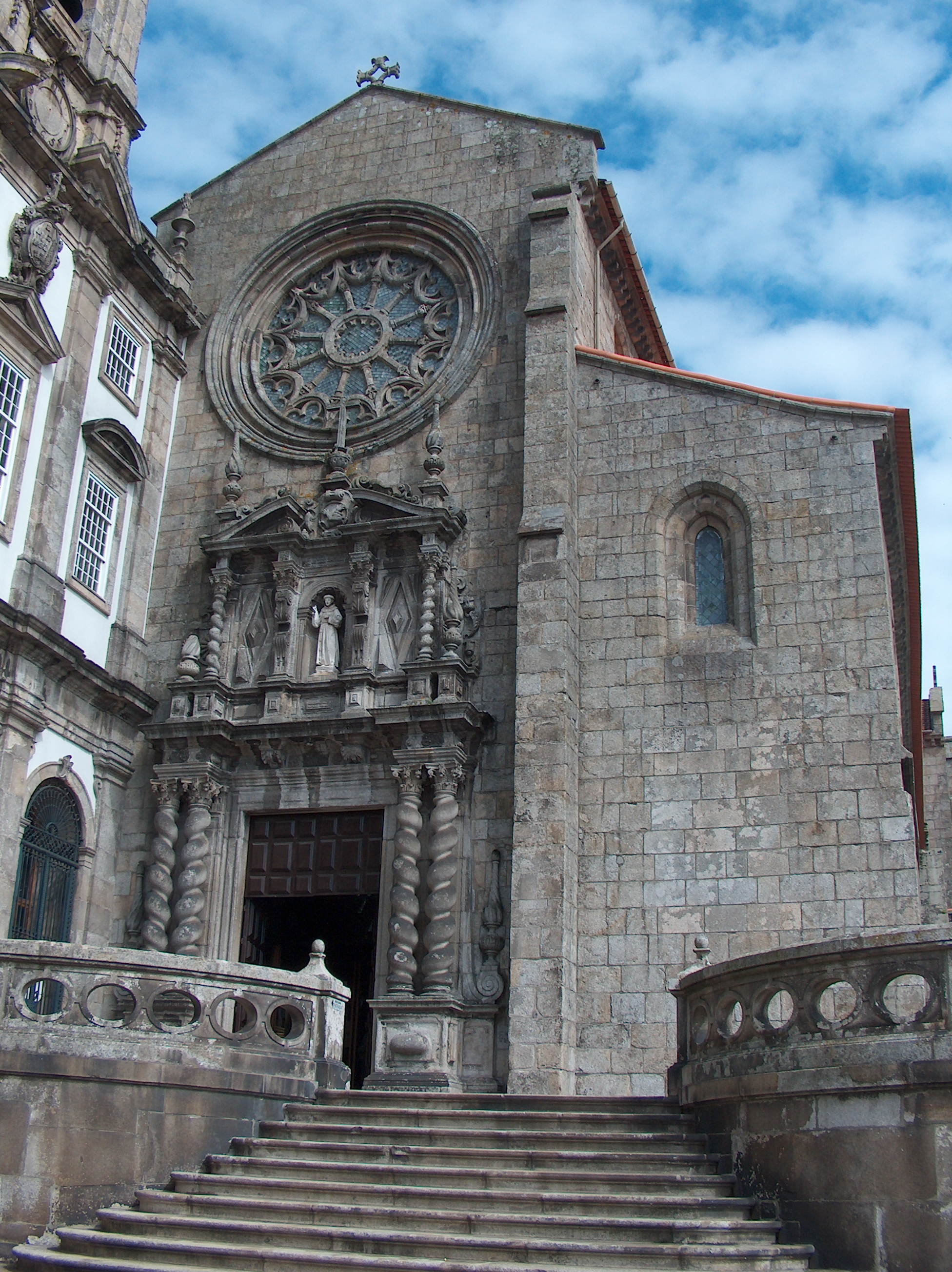 Igreja de São Francisco (Porto) This file was uploaded for Wiki Loves Monuments in Portugal with the unique identifier 70199.